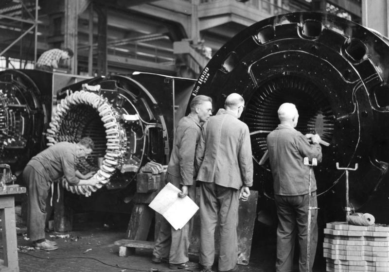 West-Berlin Wicklungseinbau im Generatorenbau in der AEG-Turbinenfabrik